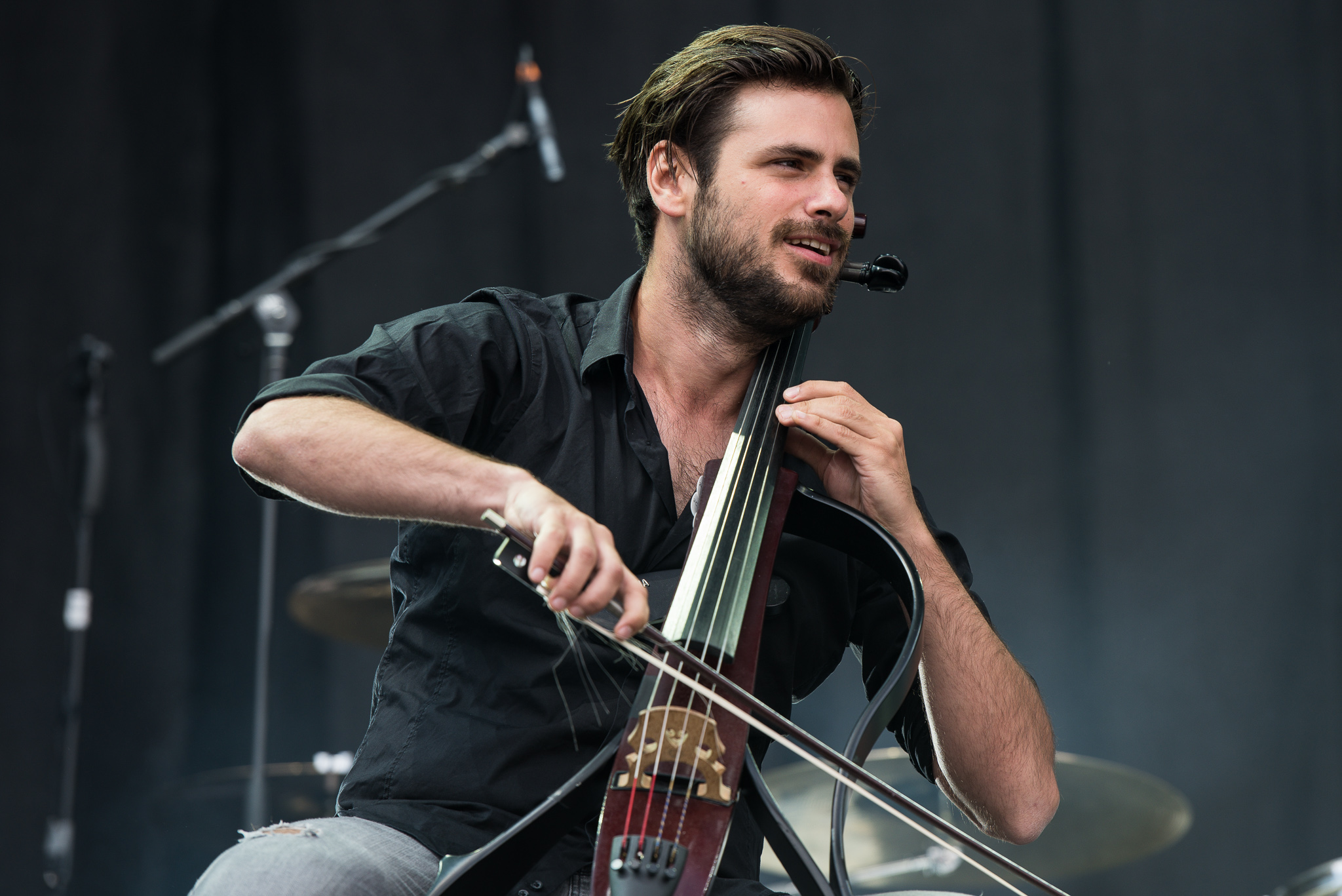 2Cellos,ARGO-Konzerte,Beck's Park Stage,Konzert,Livekonzert,Livemusik,Musik,RiP,Rock im Park 2017,Stjepan Hauser